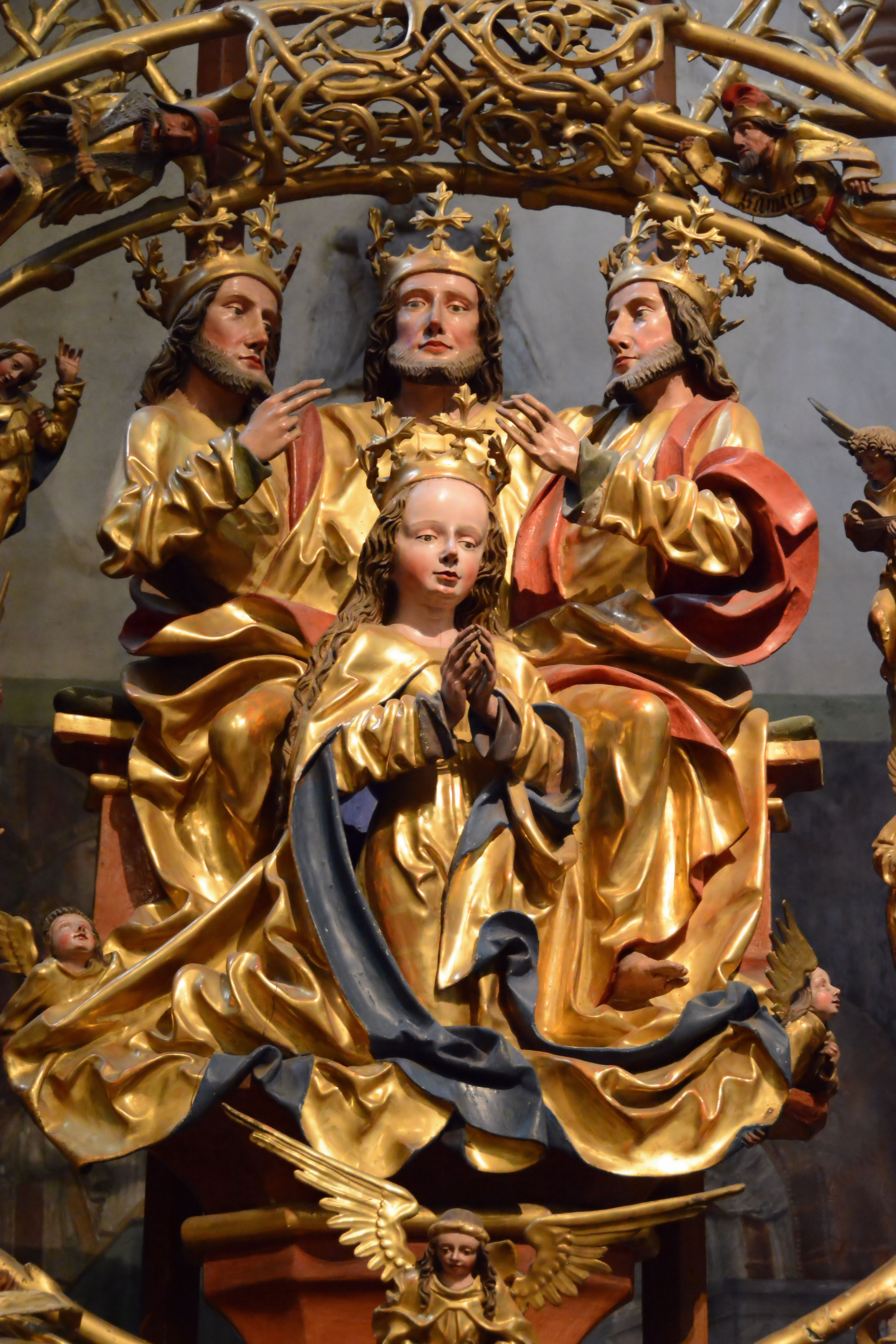 Basilika Seckau, Bischofskapelle, Maria-Krönungsaltar, Ausschnitt